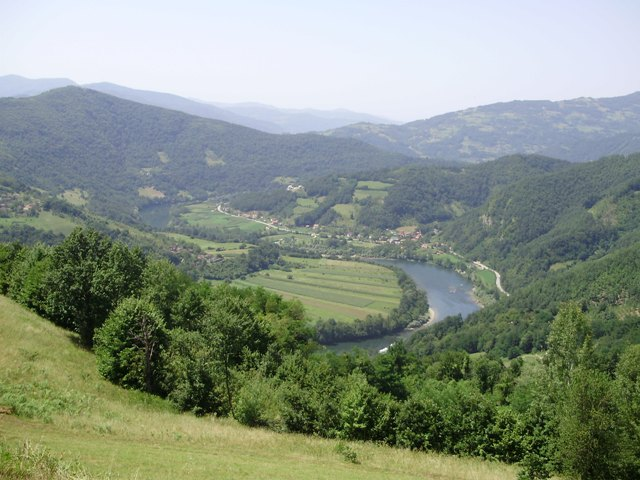 Drina